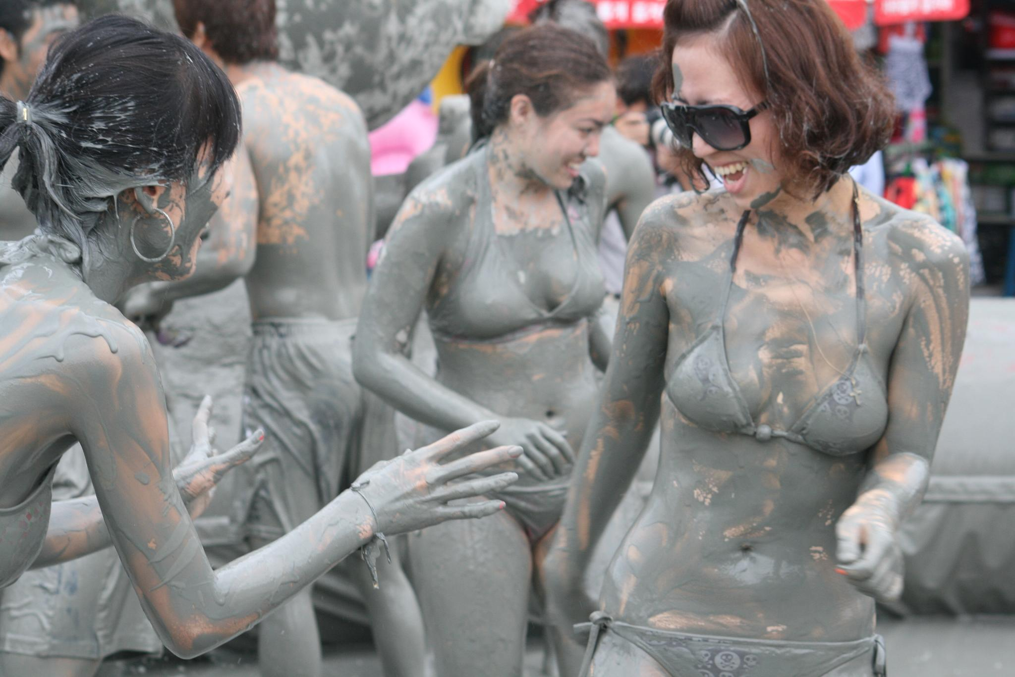 Mud Fest 2008